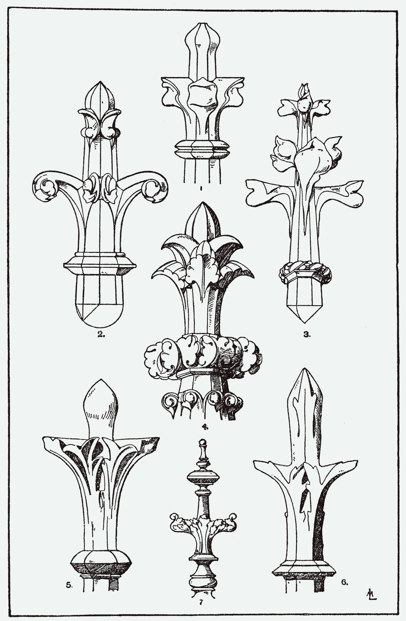 Orna111-Kreuzblumen